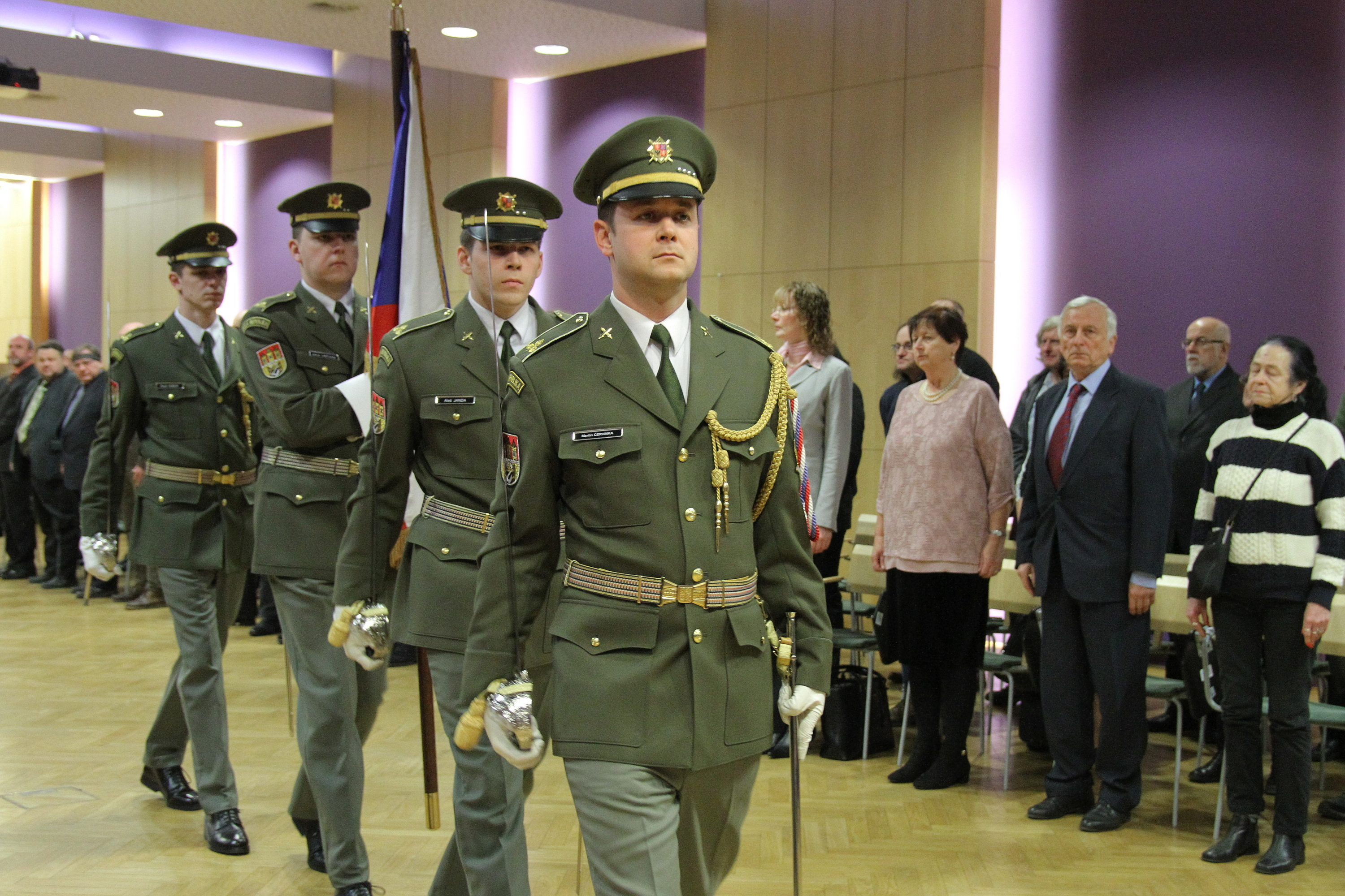 36. Z pietního aktu oceněných odbojářů (vpravo v pruhovaném svetru dcery Slezy Miroslava)